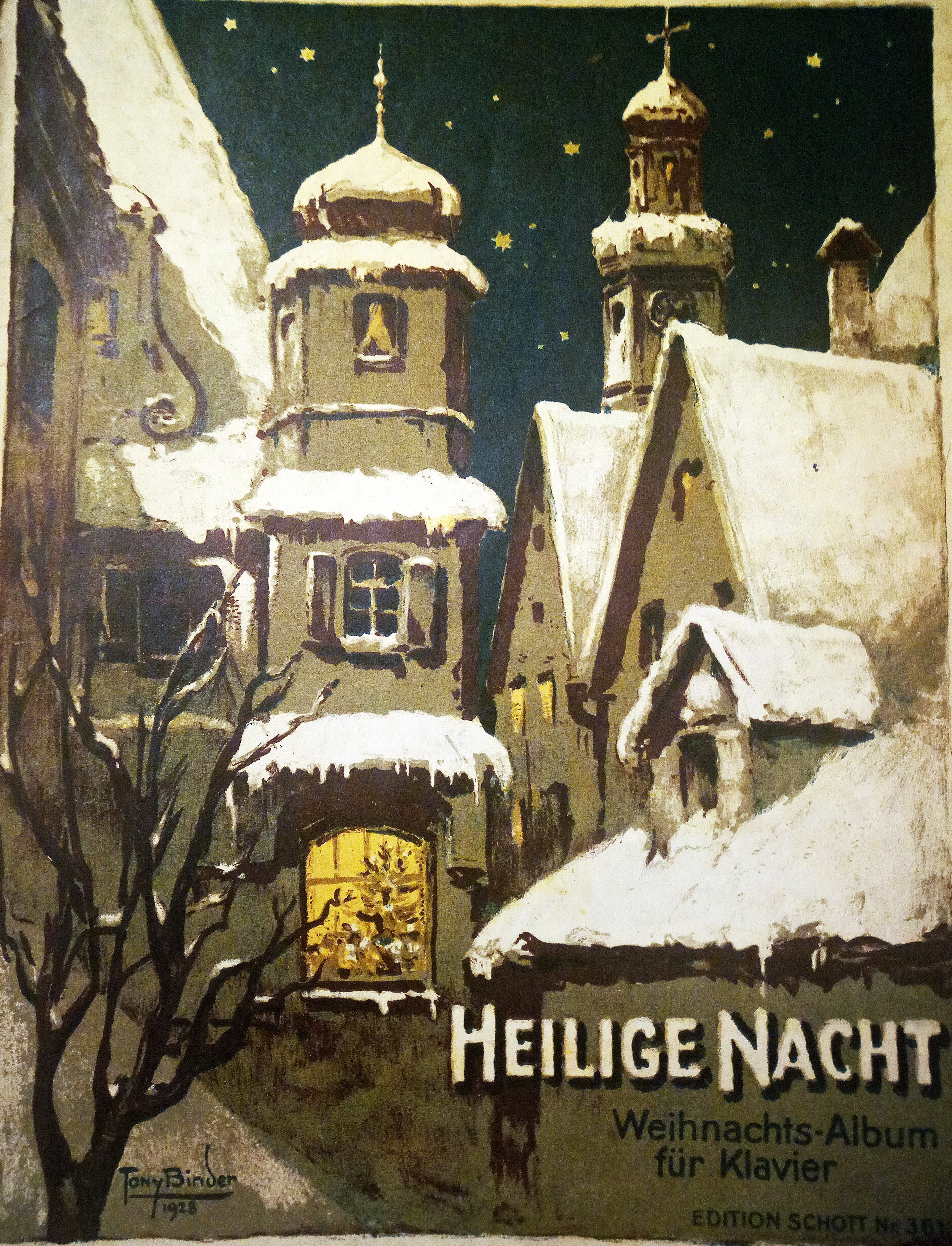 Klavier-Album, Titelblatt, Gemälde von Tony Binder (1868-1944), 1928